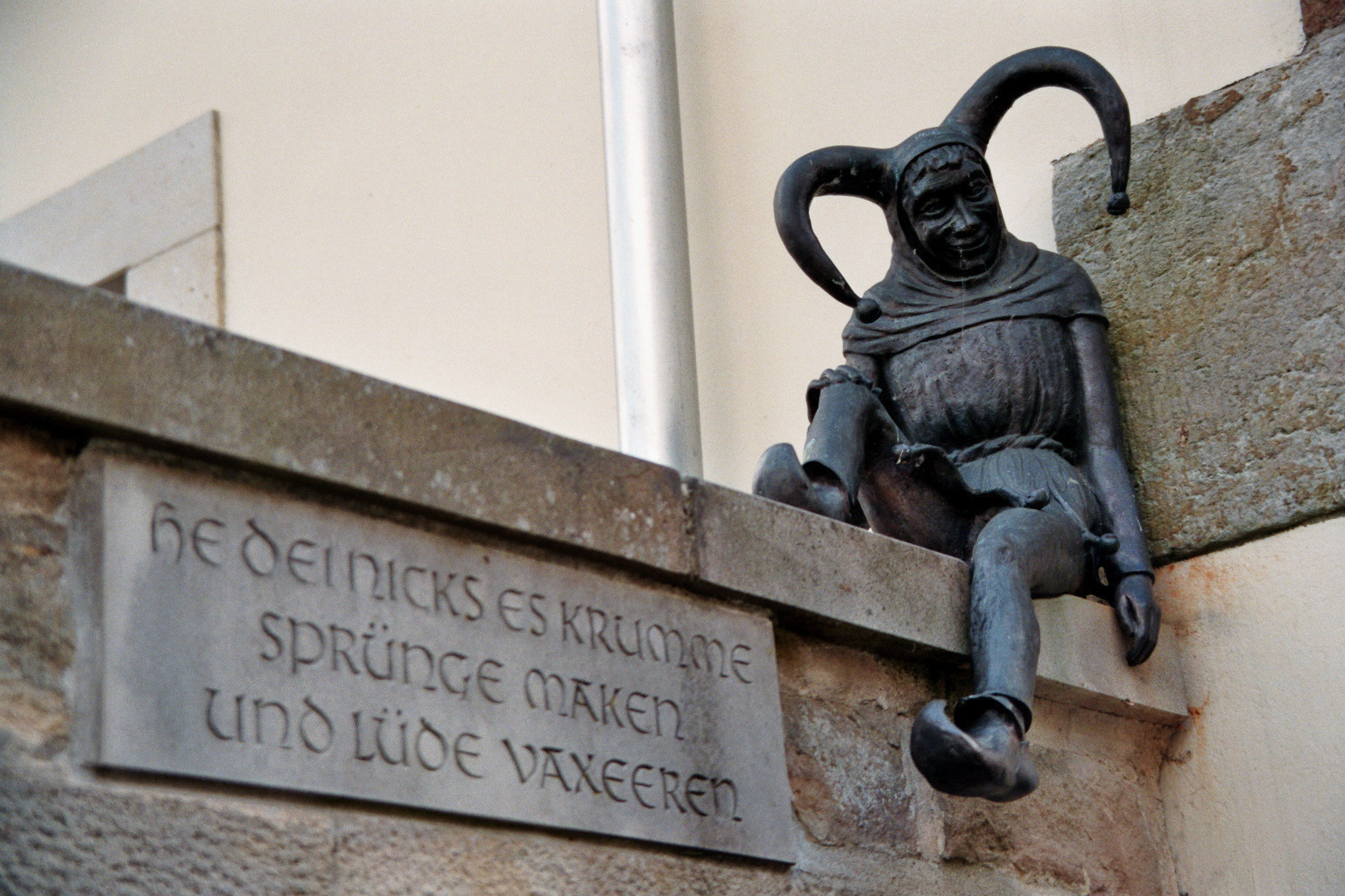 Skulptur “Vastelabendjeck” auf der Sandsteinmauer bei der alten Post in Bevergern, Nordrhein-Westfalen, Deutschland. Auf der zugehörigen Textplatte steht der Satz: “He dei nicks es krumme sprünge maken und lüde vaxeeren.”